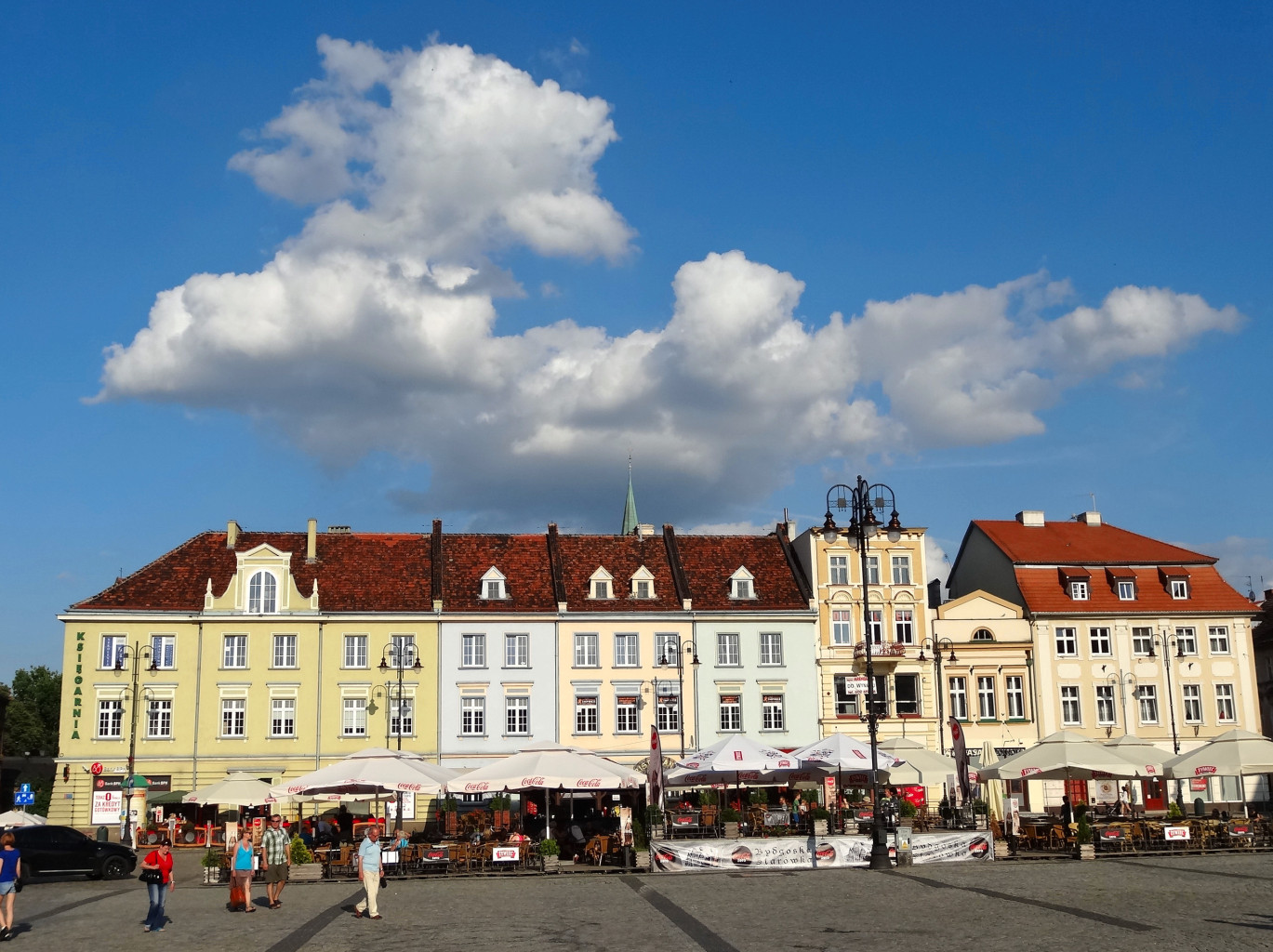 Wschodnia pierzeja Starego Rynku w Bydgoszczy